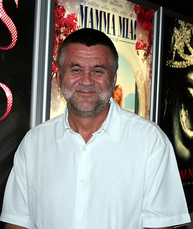 Premijera filma "Nije kraj" u Zagrebu, Rajko Grlić